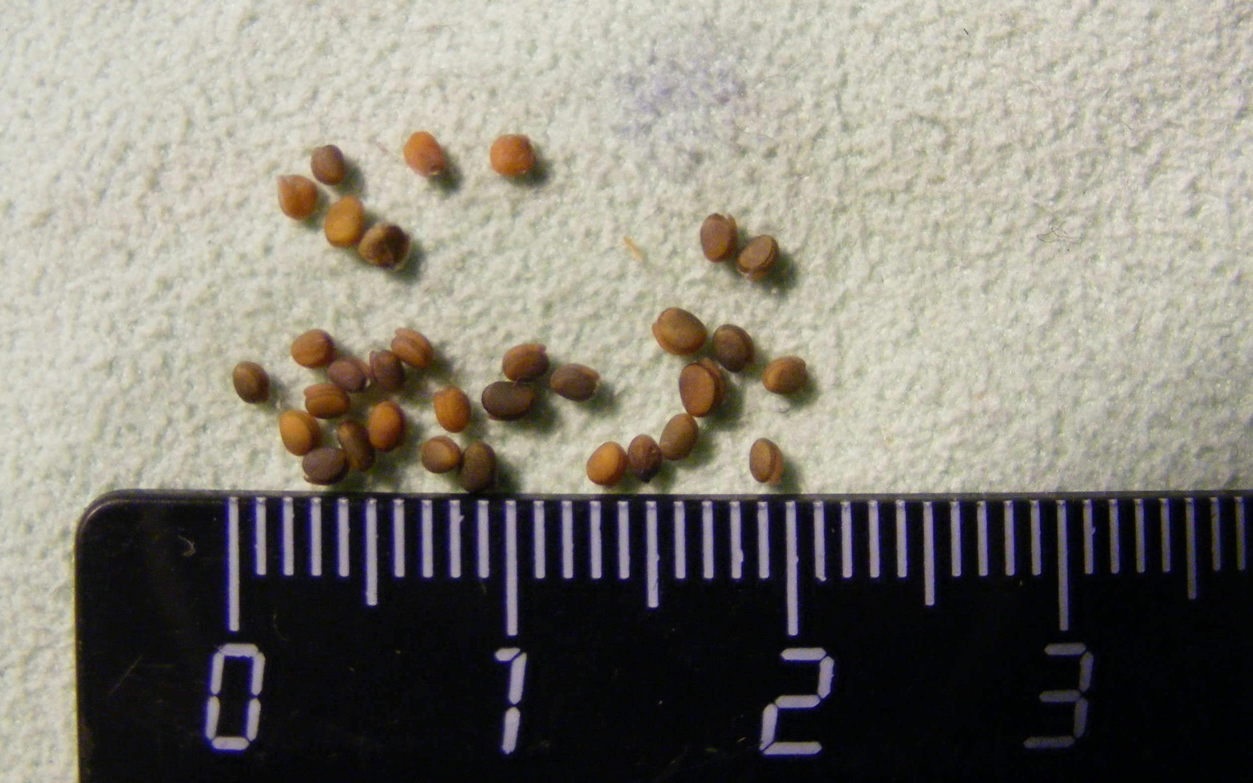 Семена рукколы (эруки посевной).